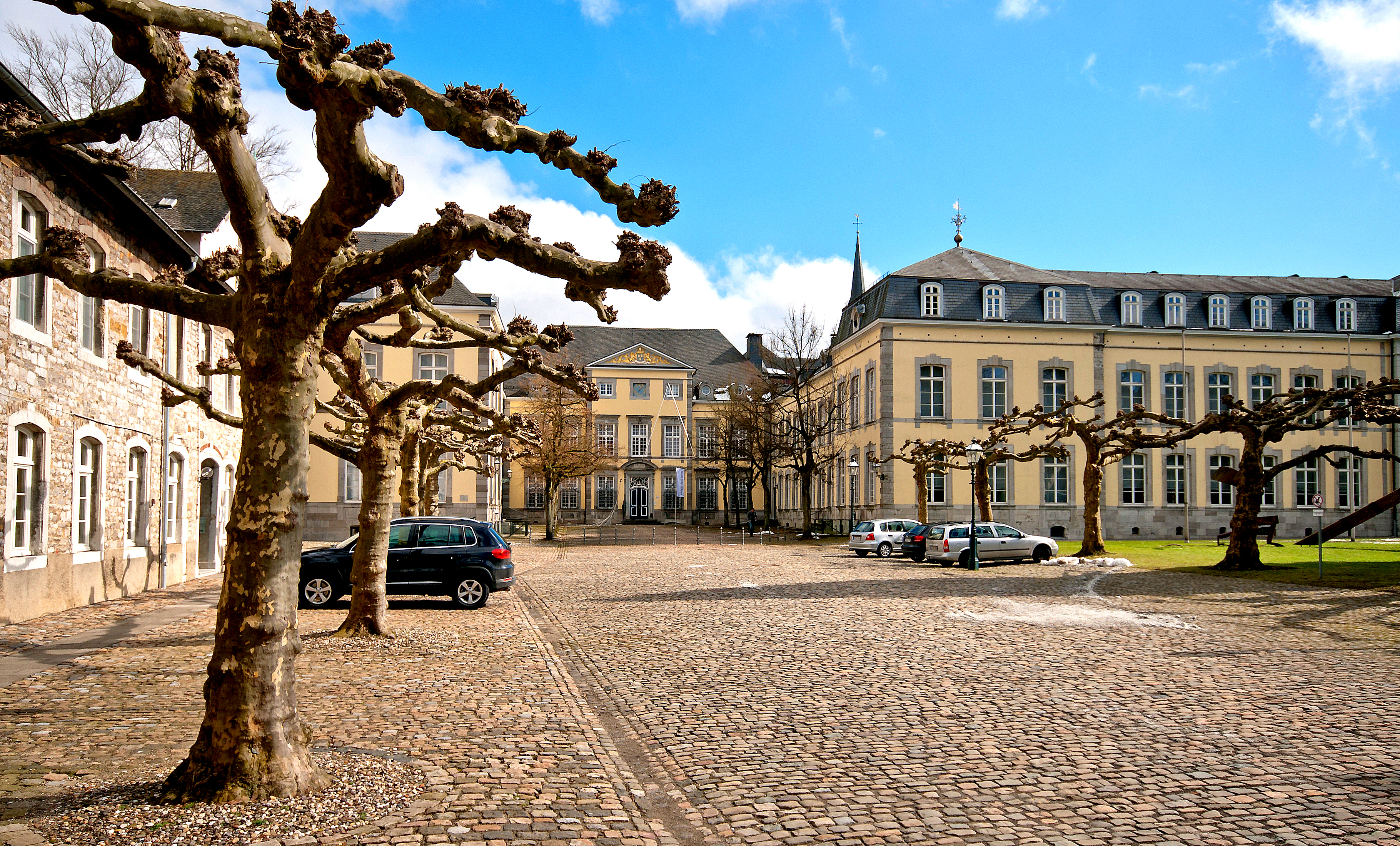 Blick über den Hof der Reichsabtei in Kornelimünster